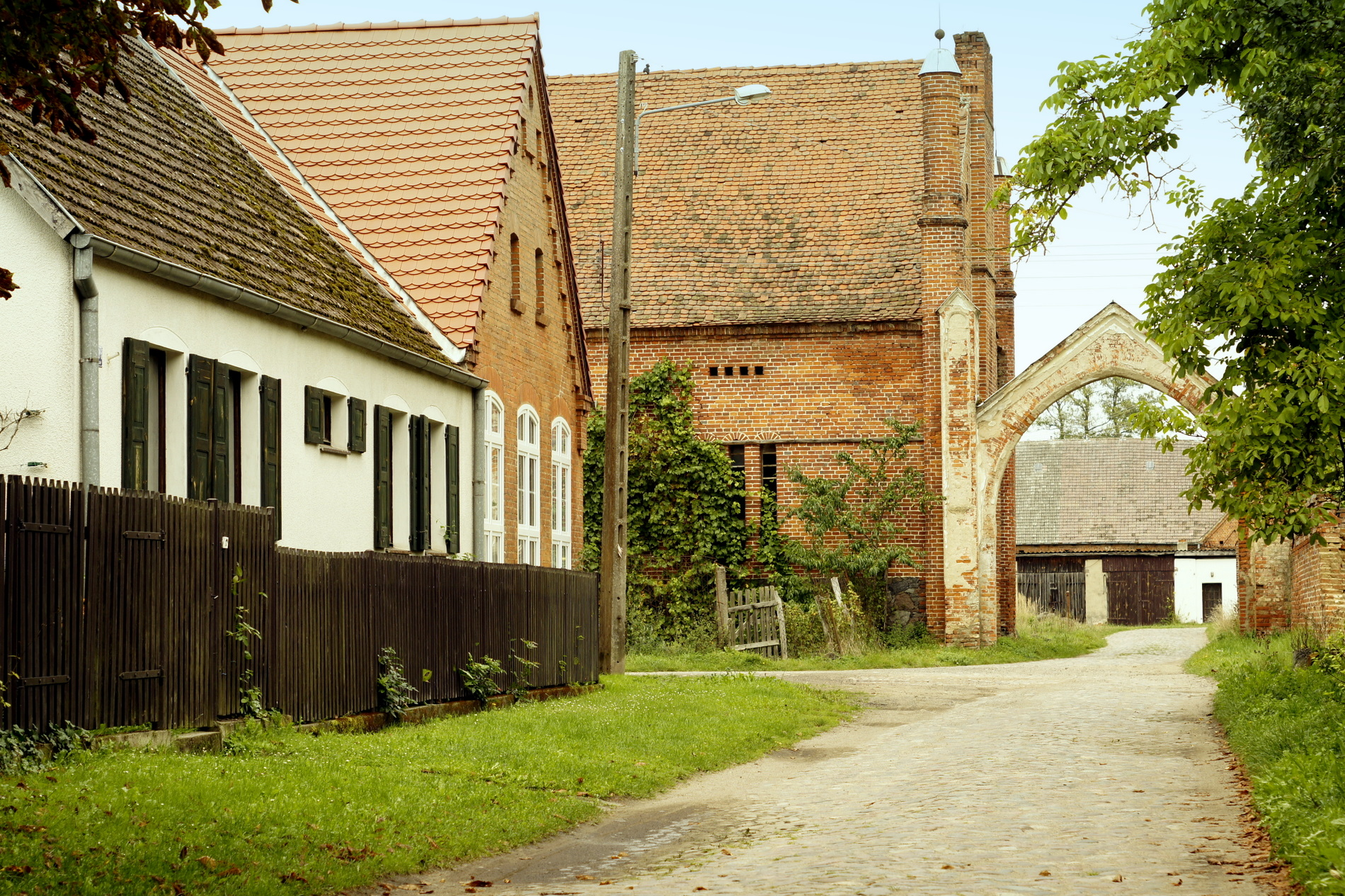 Danków, zespół folwarczny z drugiej poł. XIX - brama wjazdowa do folwarku ( wschodnia ). Po lewej widoczny budynek szkoły ( dziś świetlica wiejska ) i stodoły.